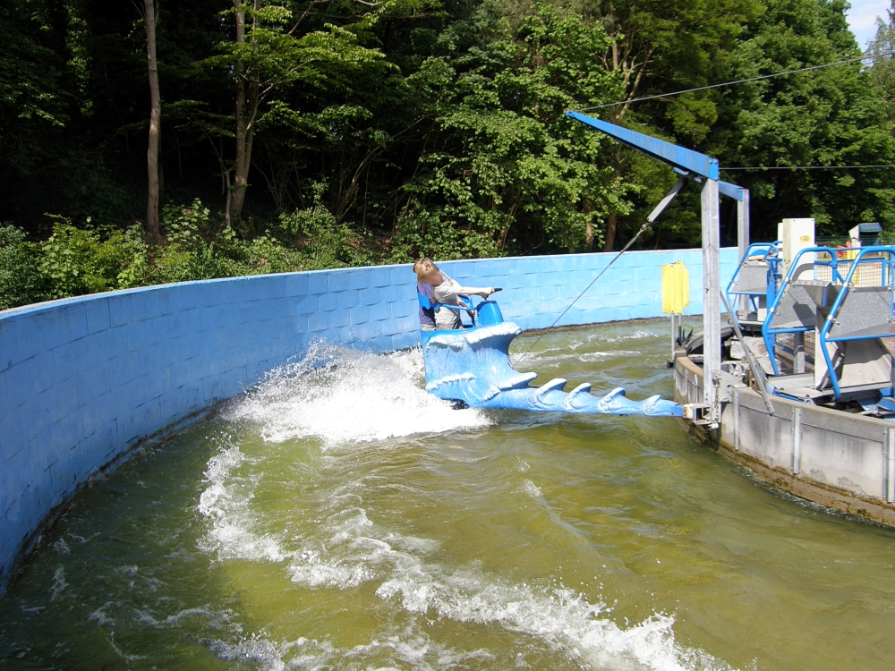 Der Wingster Sport und Freizeitpart im Frühling